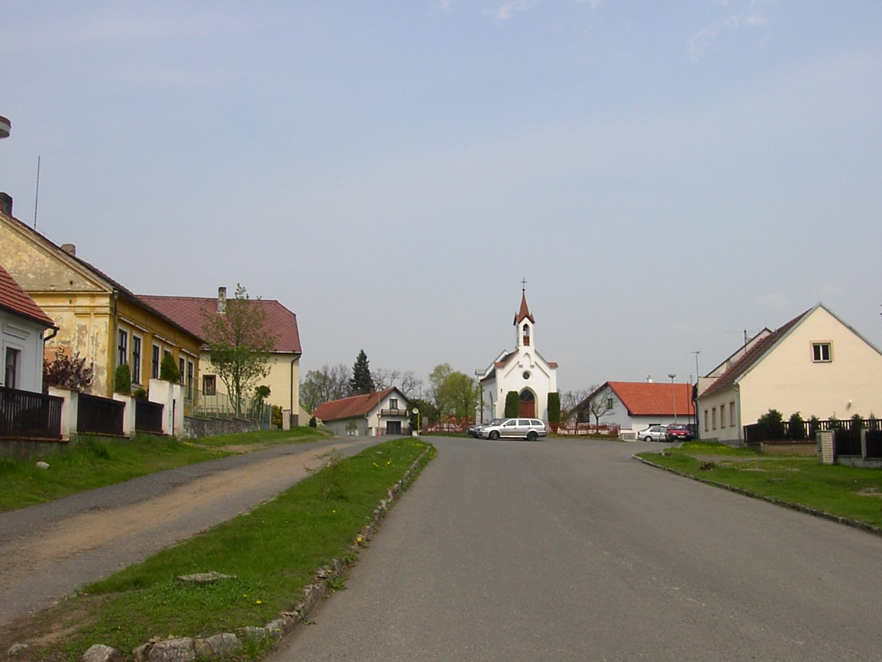 Kaple ve Staré Huti, okres Příbram.